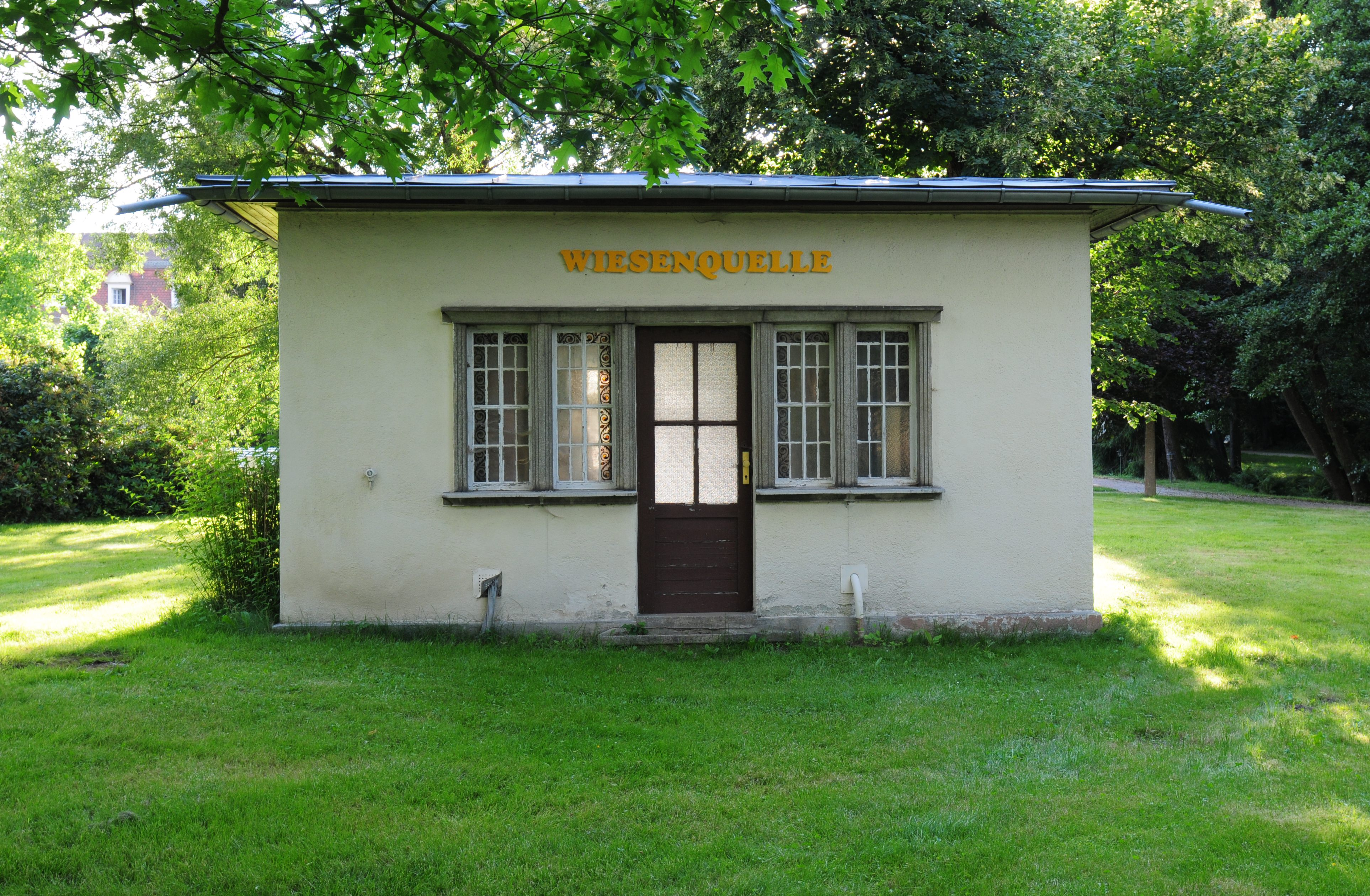 Gemeinde Bad Brambach, Kurpark Bad Brambach, Wiesenquelle (Vogtlandkreis, Freistaat Sachsen, Deutschland)